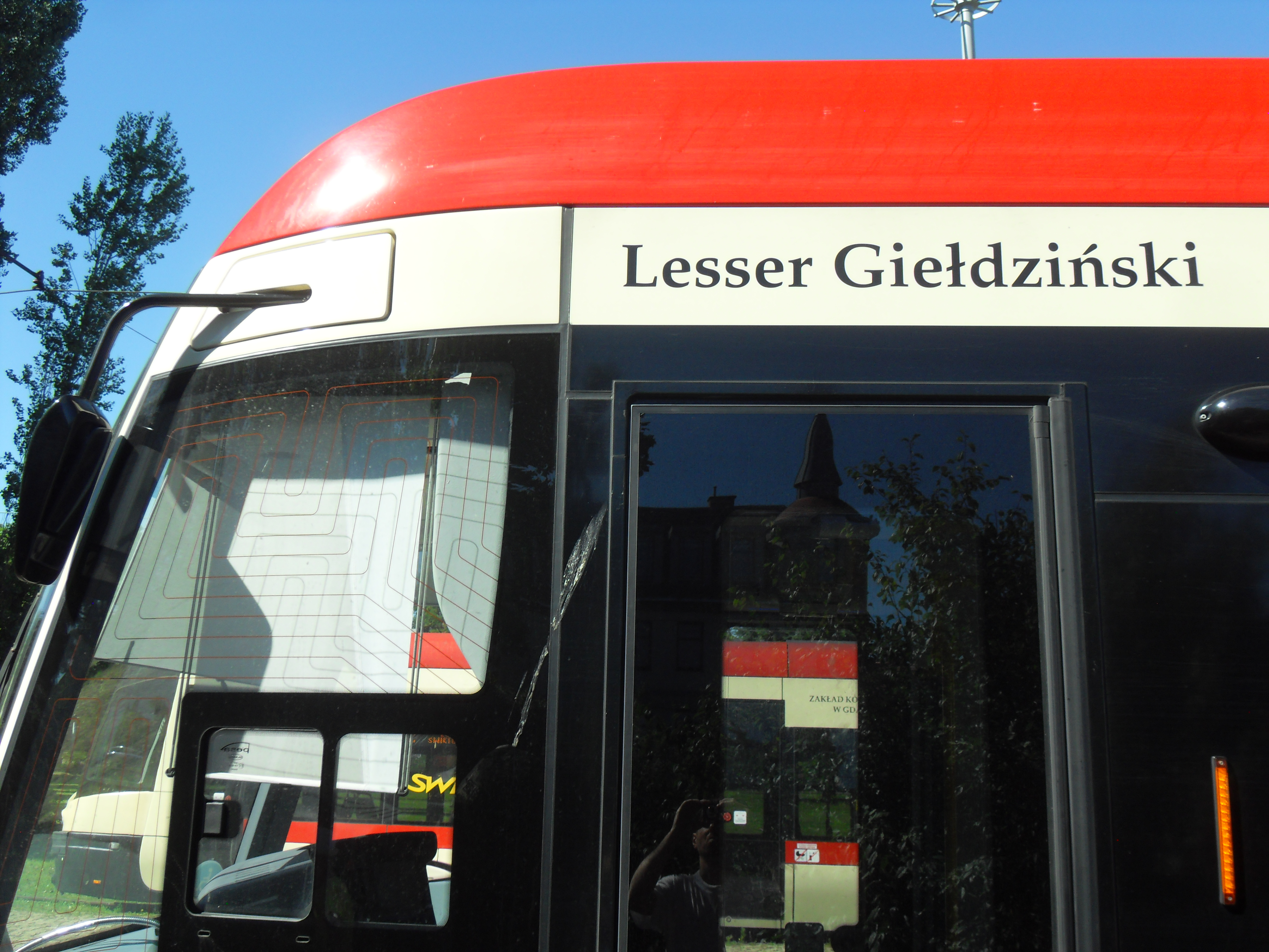 Gdańsk Oliwa, tramwaj Pesa Jazz 128NG nr 1054 im. gdańszczanina Lessera Giełdzińskiego.